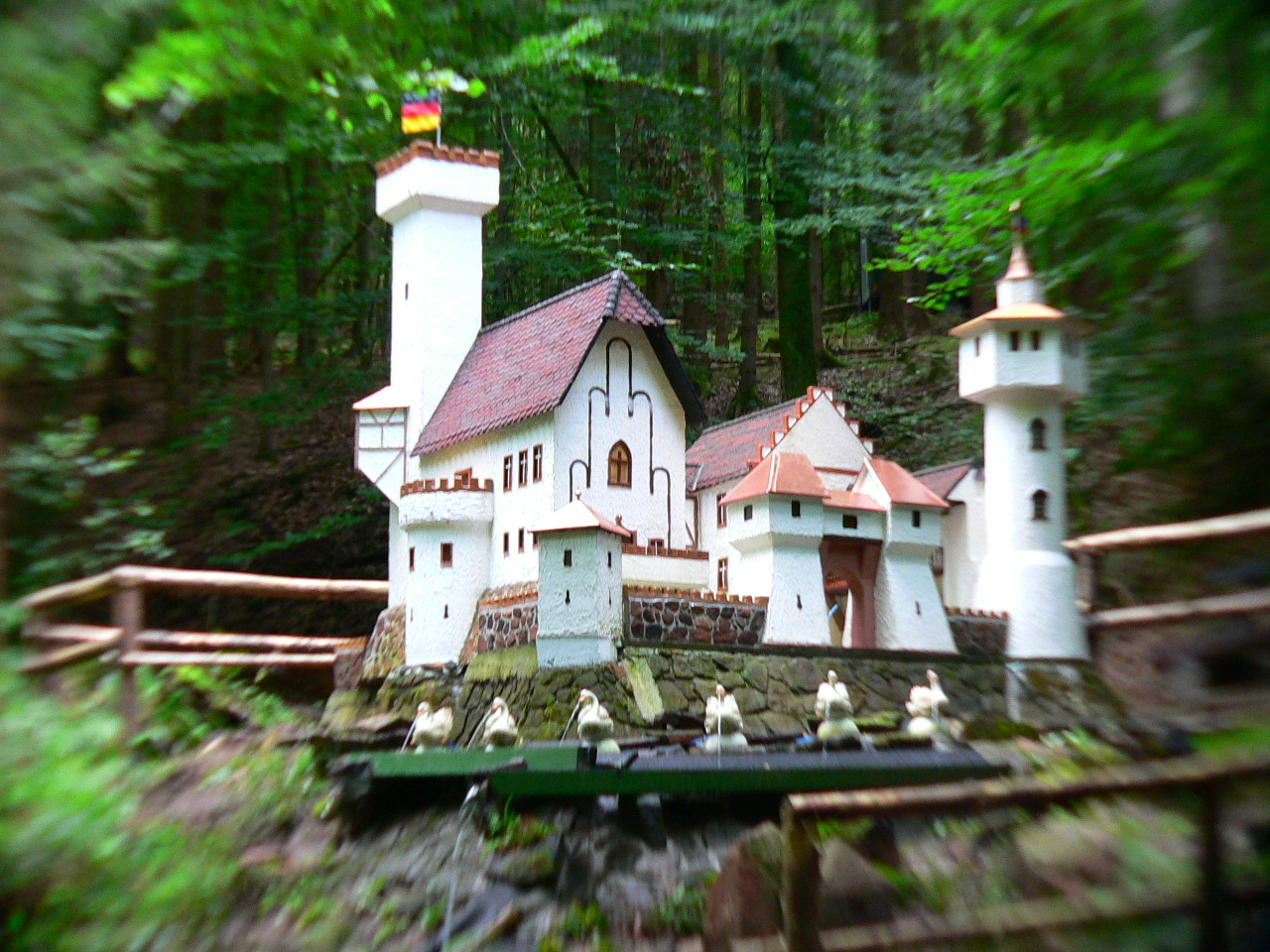 Miniatur eines Schlosses in der Obrunnschlucht bei Höchst im Odenwald